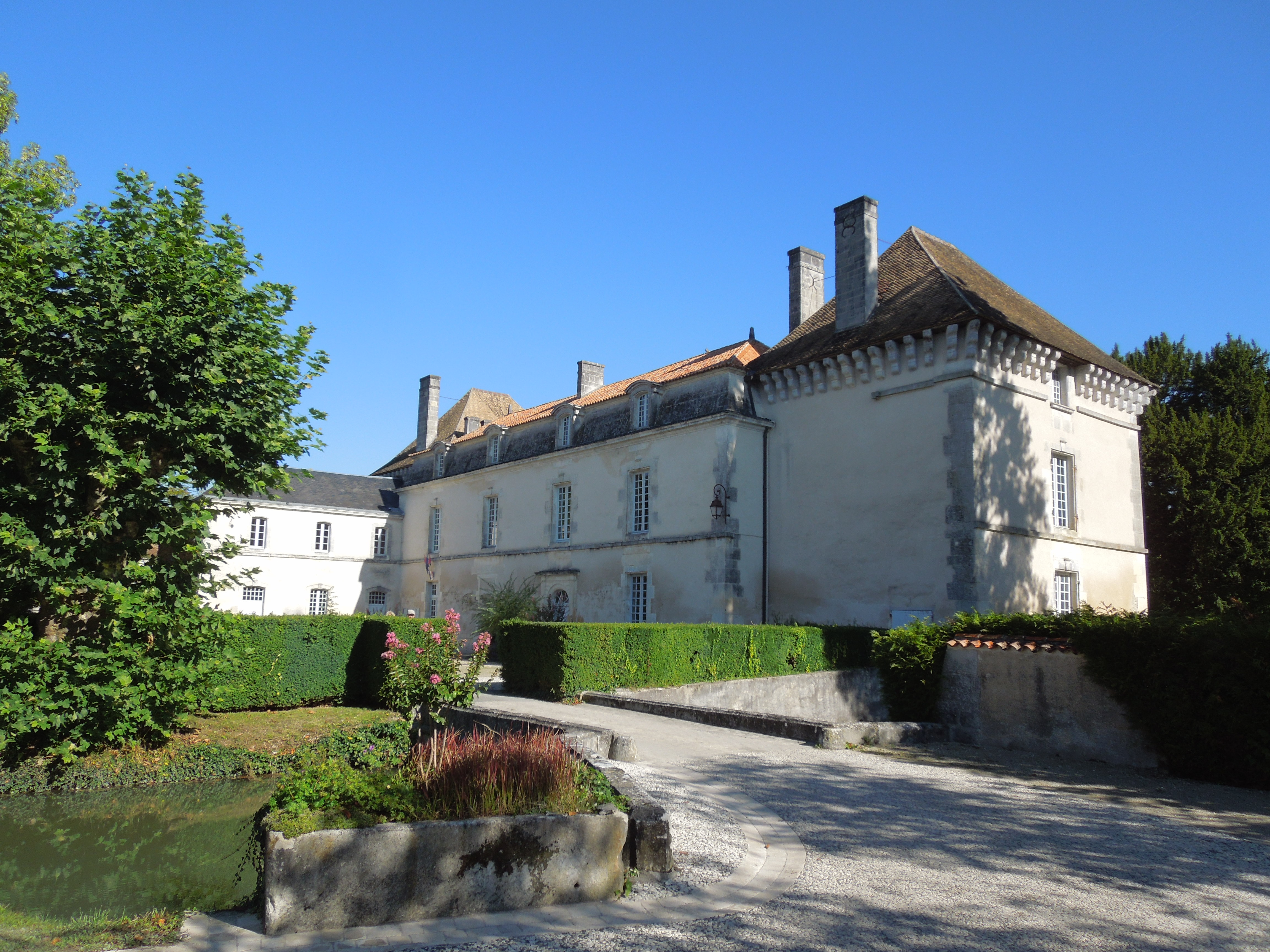 Das Château de Lignières in Lignières-Sonneville, Westseite und Wassergraben von Südwesten